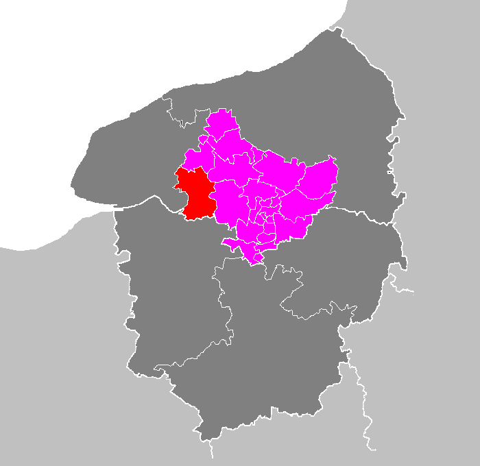 Maps of arrondissements and cantons of France: Arrondissement de Rouen - Canton de Caudebec-en-Caux.PNG